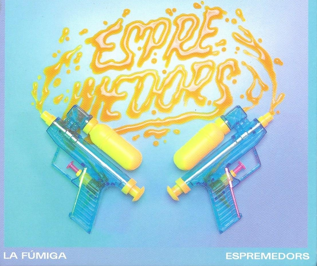 Escànner de la caràtula del primer disc de La Fúmiga, produït per Halley Records